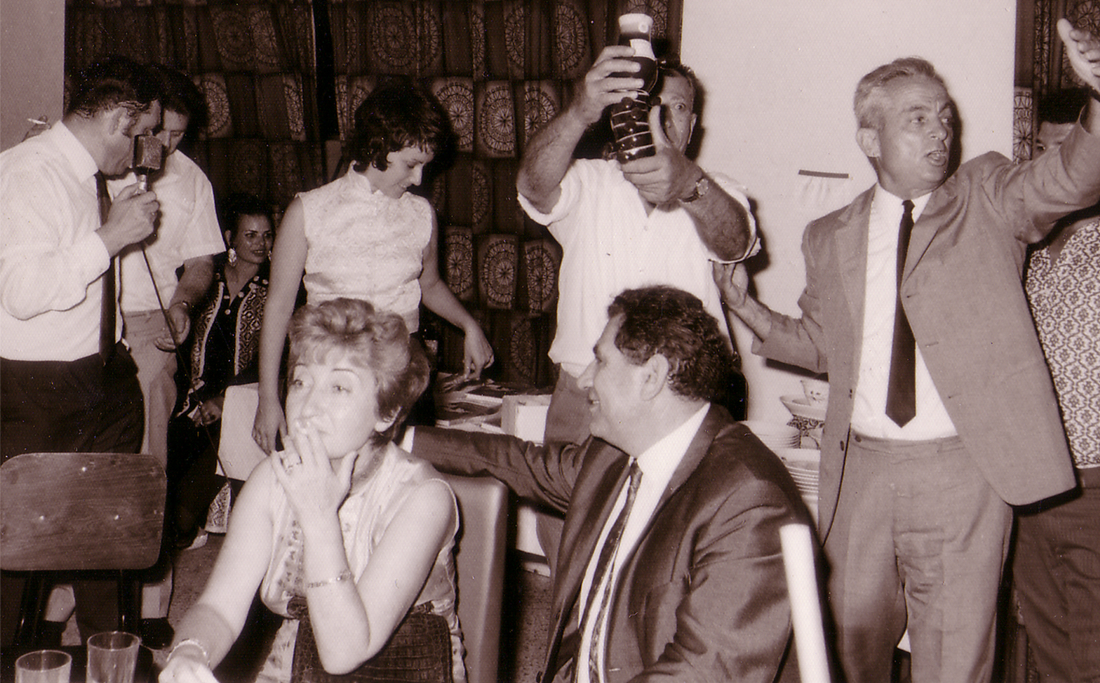 מלכה ברוורמן עם בעלה השני